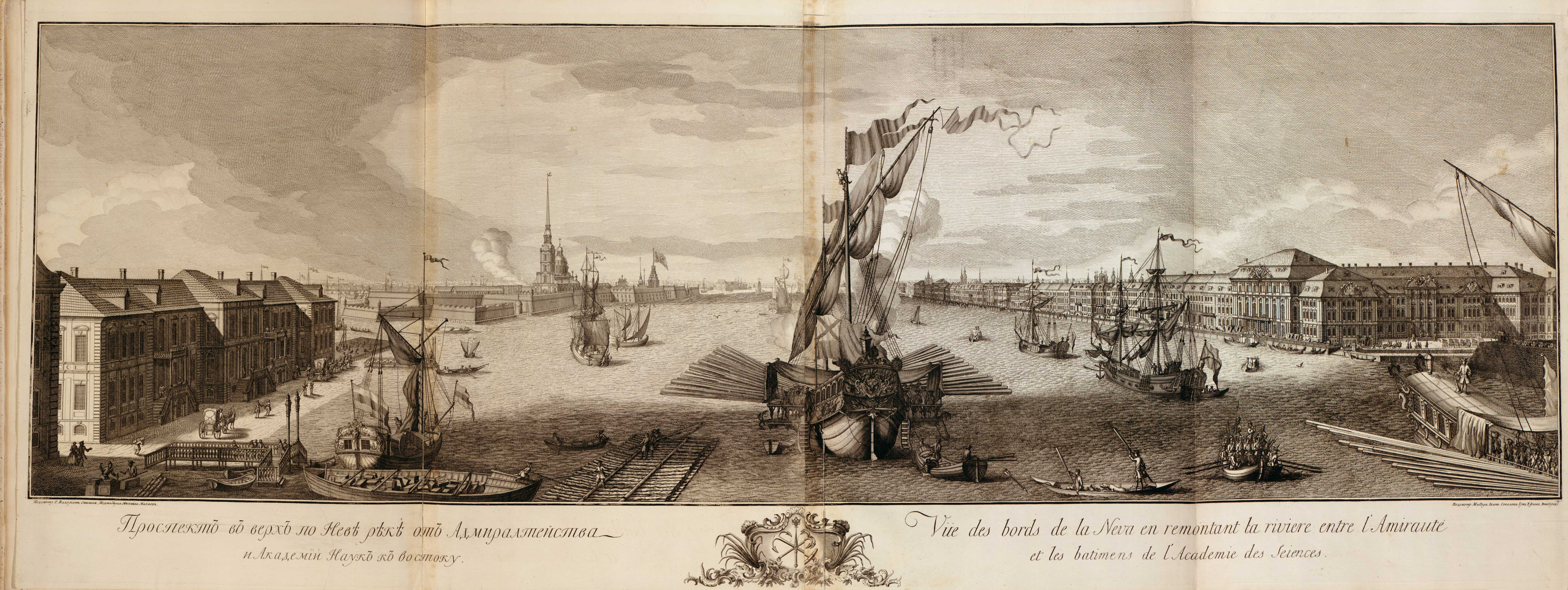 Szentpétervár kikötője a 18. században